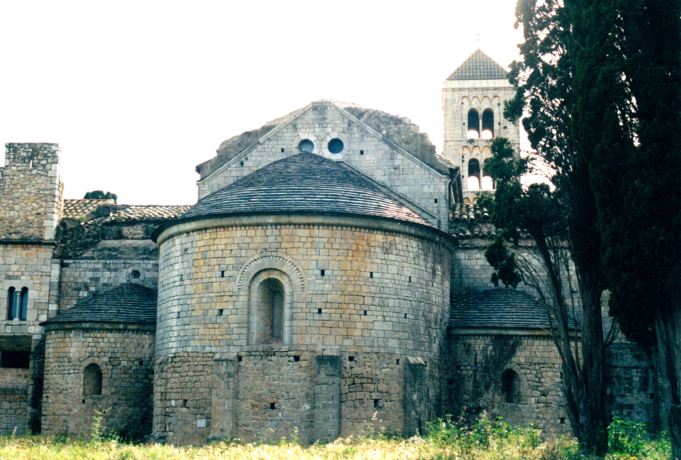 Espagne - Catalogne - Monastère de Santa Maria de Vilabertran